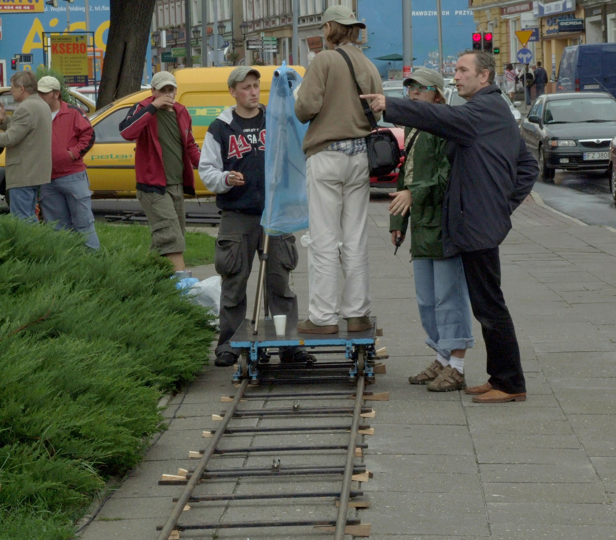 Na planie filmu "Zamknięci w celuloidzie", Zielona Góra 2006